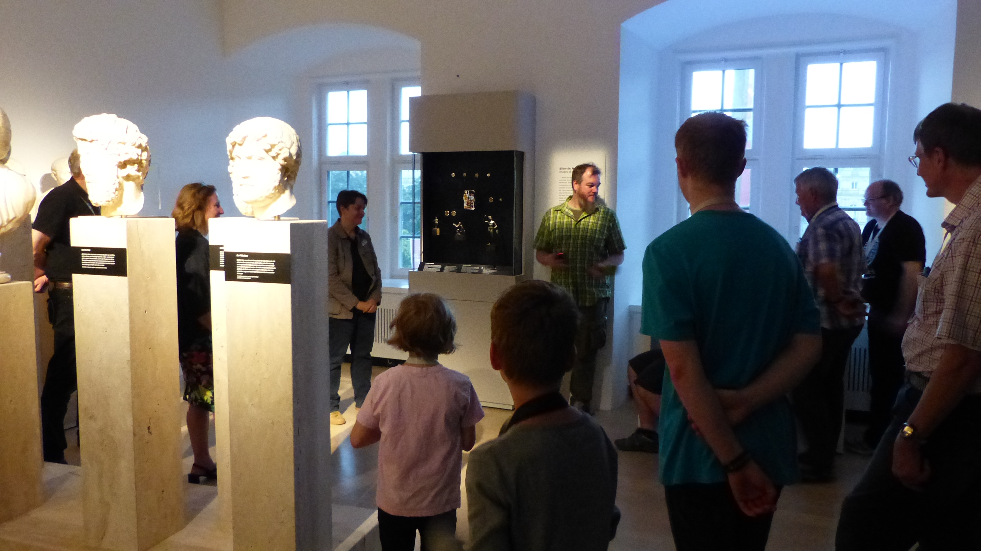 GLAM-on-Tour-Treffen im Landesmuseum Württemberg in Stuttgart 2016